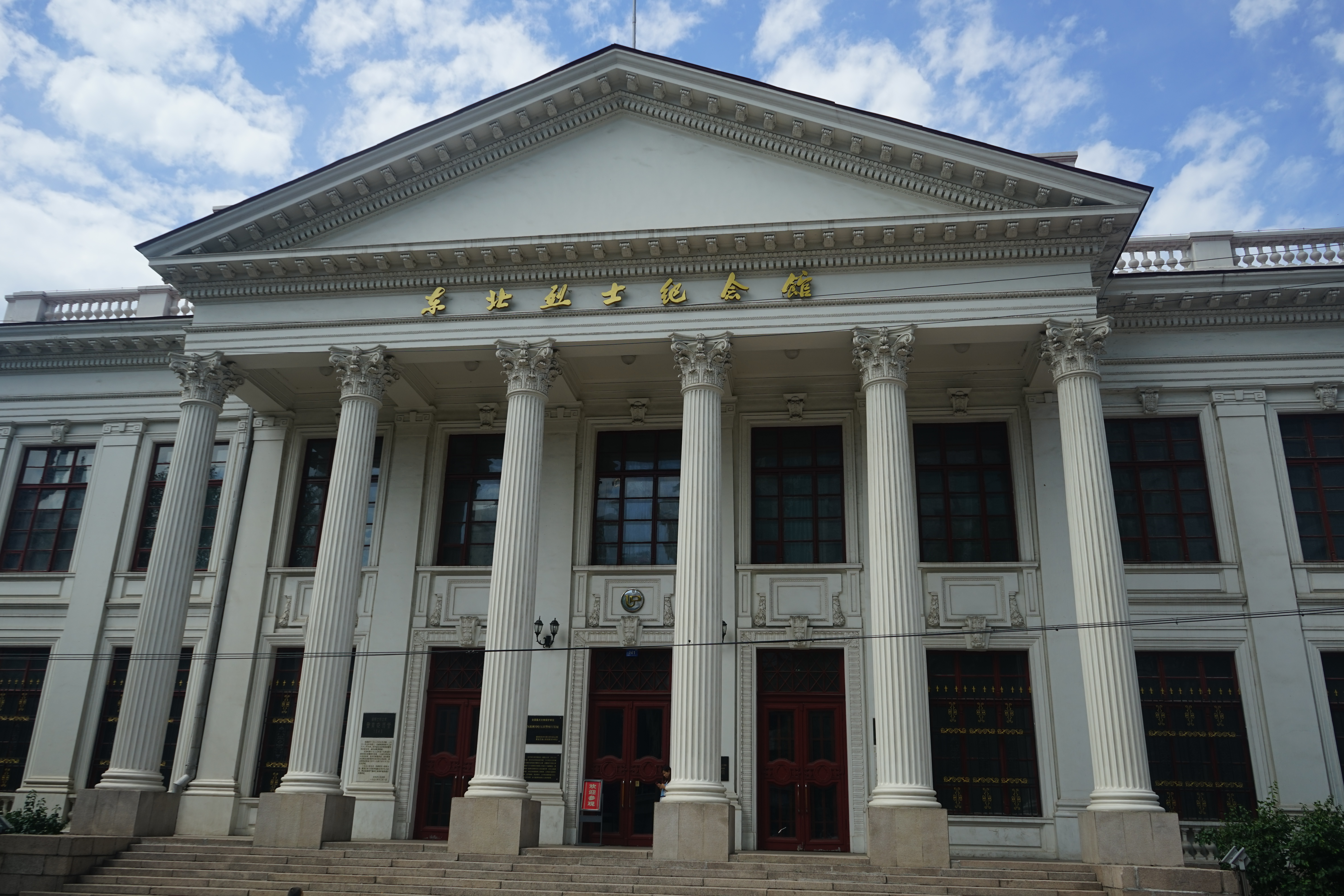 东北烈士纪念馆2017夏。正面